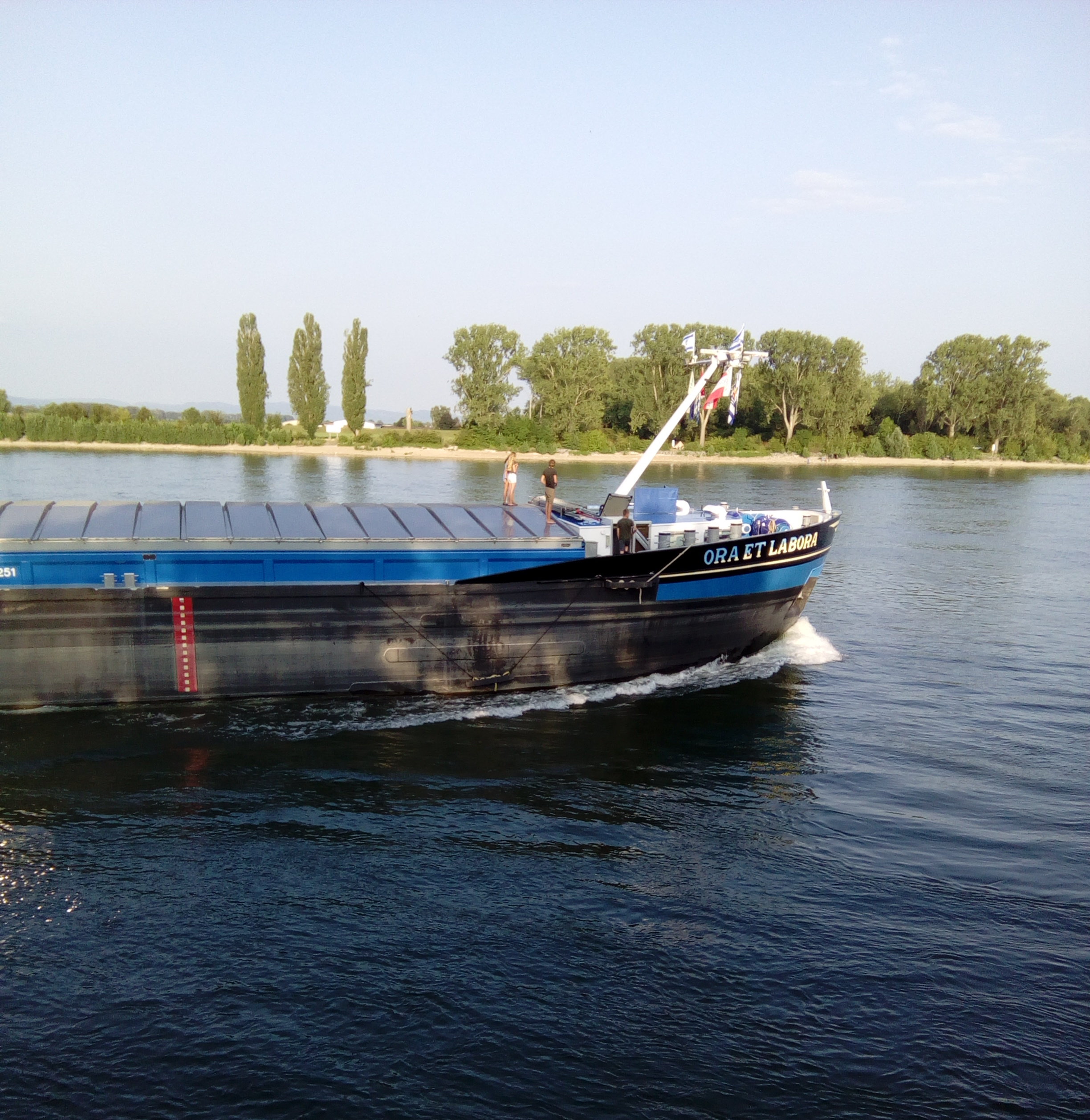 Niederländischer Lastkahn auf dem Rhein bei Worms im Sommer 2019 Die Bezeichnung Lastkahn ist richtig: [1].